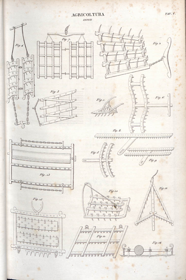 Erpice tratto da Nuova enciclopedia popolare. 13